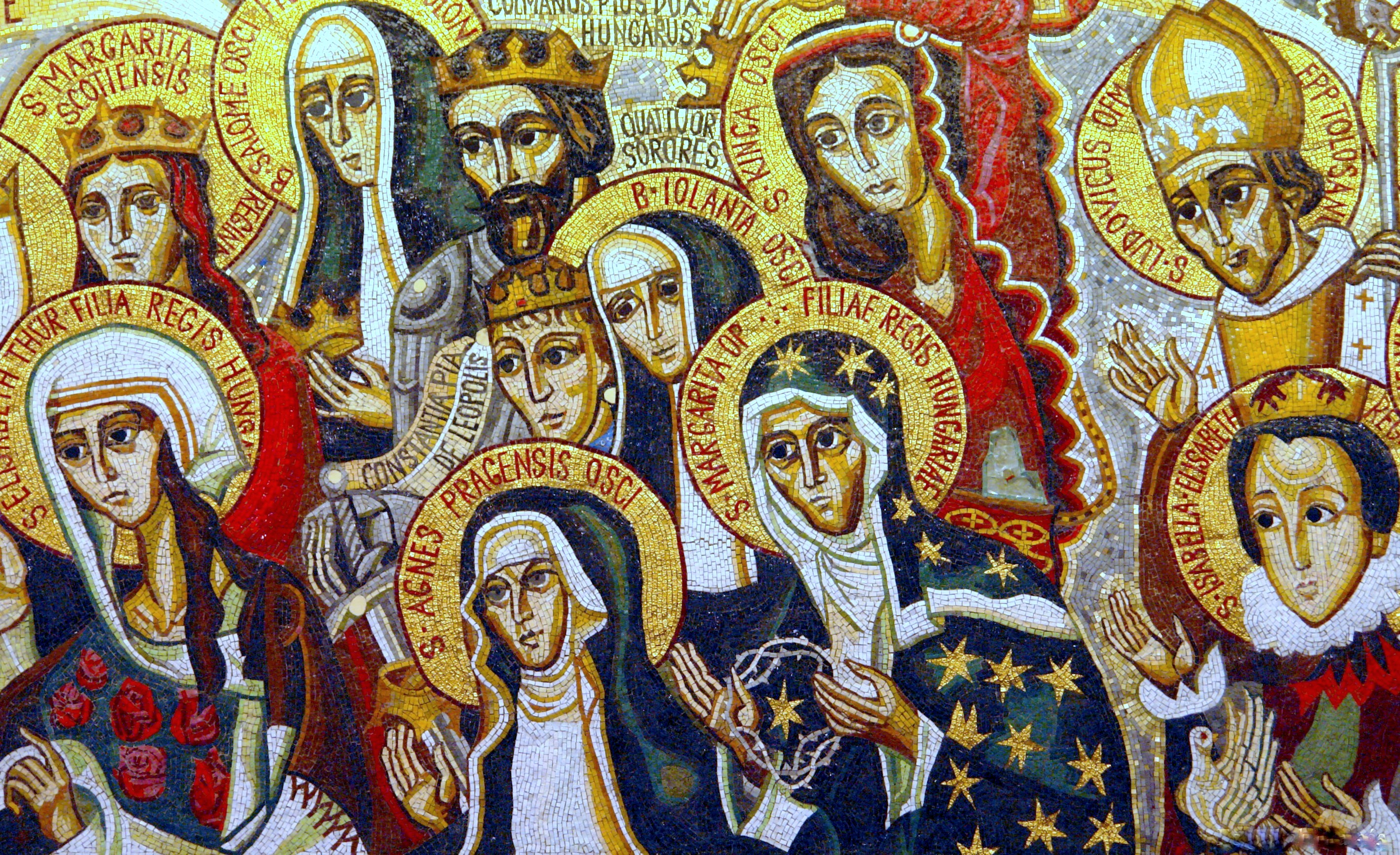 Krakkó, Isteni Irgalmasság-templom Magyar Kápolnájában: magyar szentek és boldogok mozaik-sorozat, 2004. (részlet)